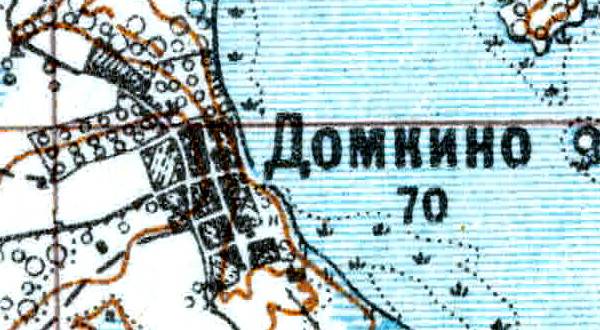 Топографическая карта Ленинградской области, квадрат VIc-28 (Луга), деревня Домкино